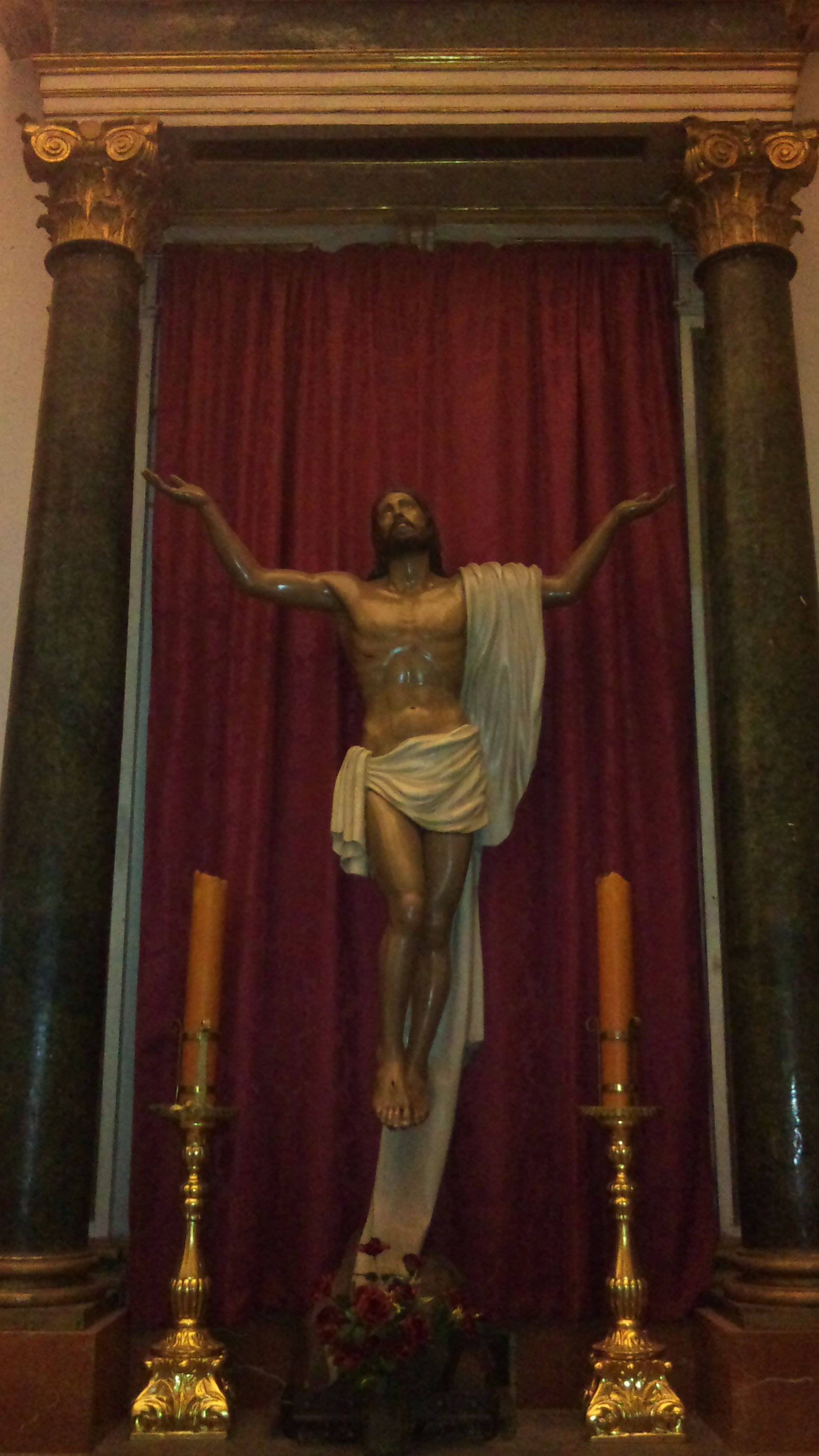 Cristo Resucitado de Jaén, obra de Rafael Rubio Vernia en 1952.